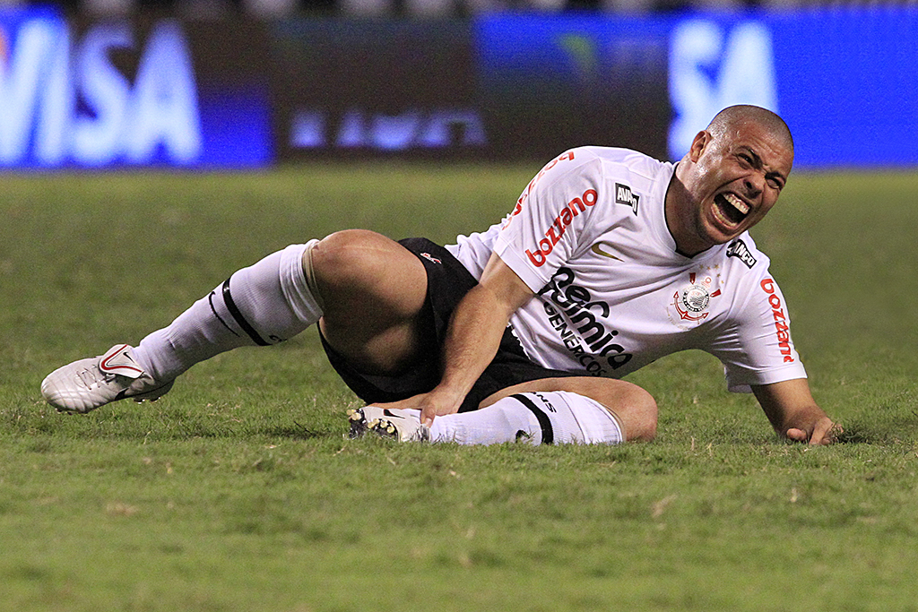 Flamengo 1 x 1 Corinthians Brasileirão 2010 - Engenhão